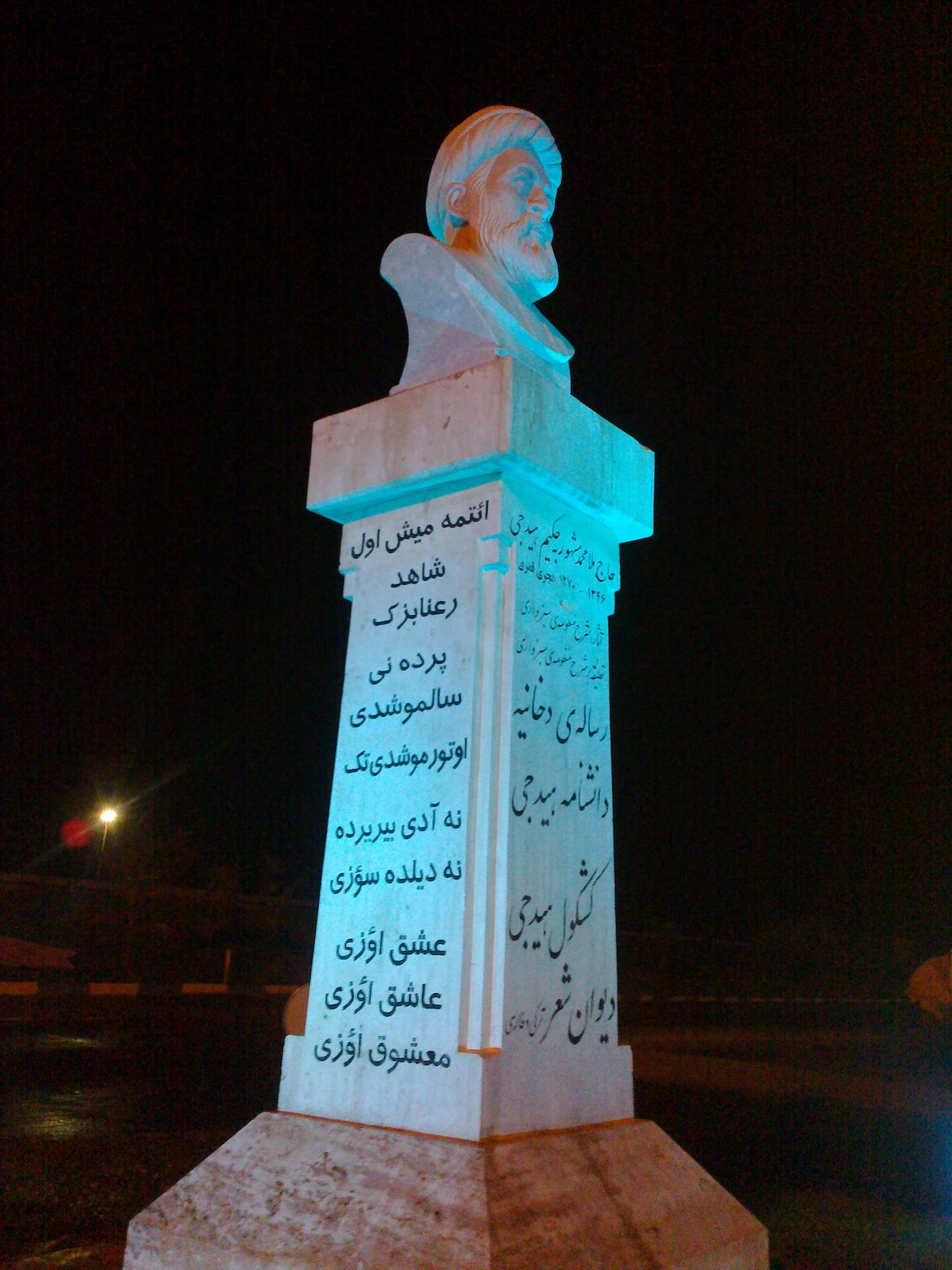 تۆرکجه: حکیم هیدیجی نین آبیده سی